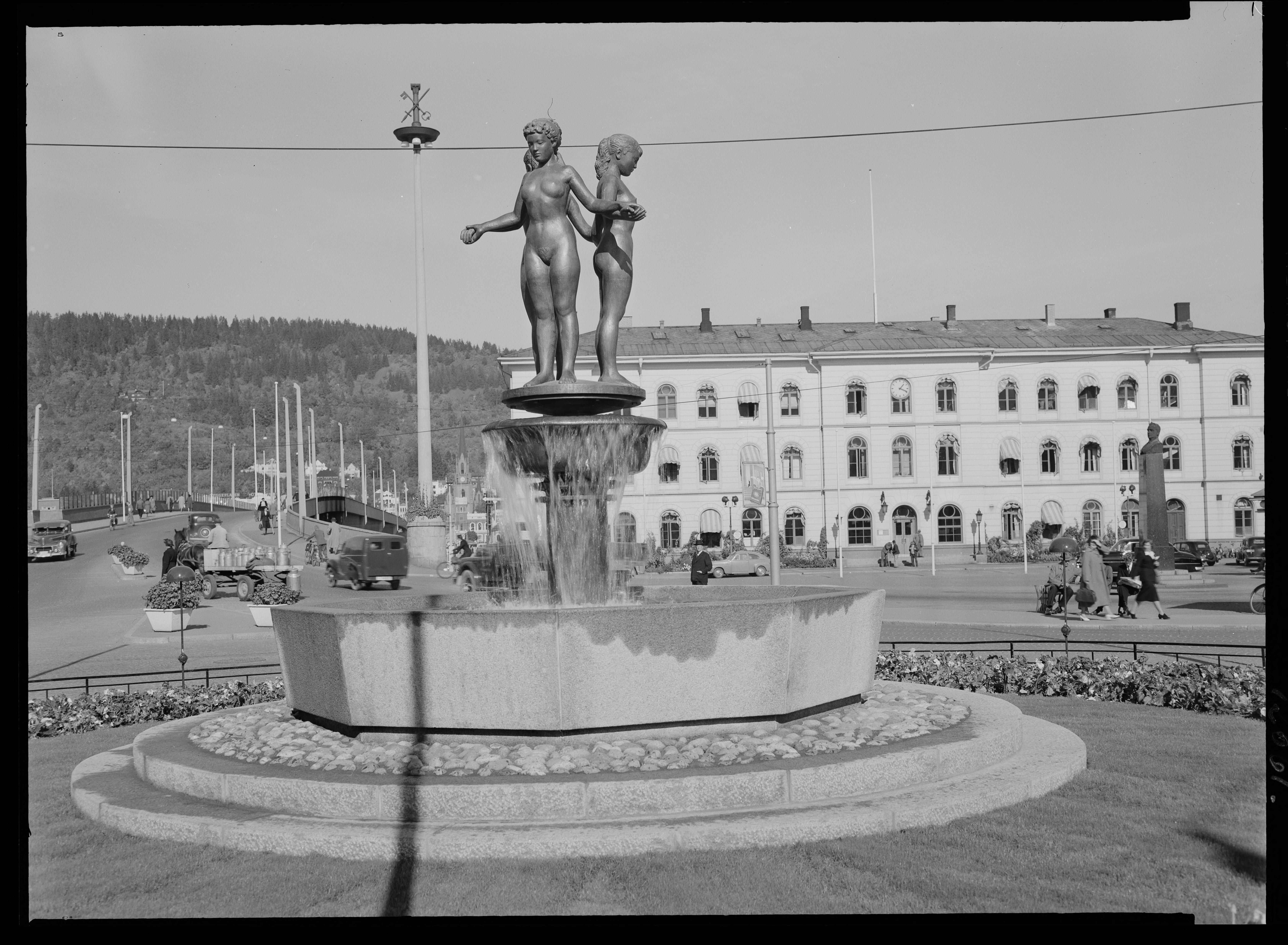 Bildet er hentet fra Nasjonalbibliotekets bildesamling. Anmerkninger til bildet var: Fotograf : ukjent Drammen, Drammen, Buskerud Per Hurums skulptur «De tre bydeler» oppført på Strømsø torg i 1952.